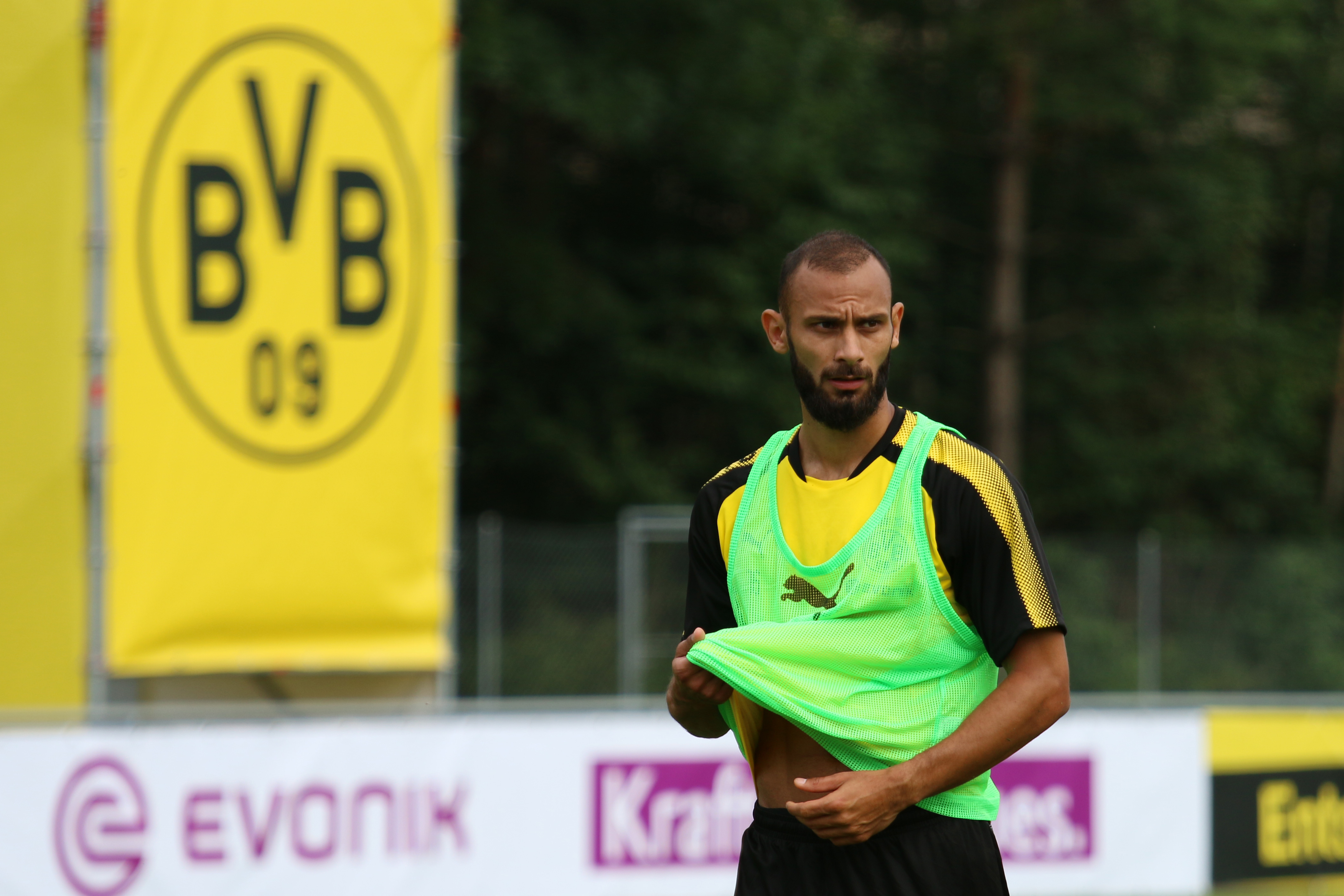 Ömer Toprak im BVB Trainingslager in Bad Ragaz 2017